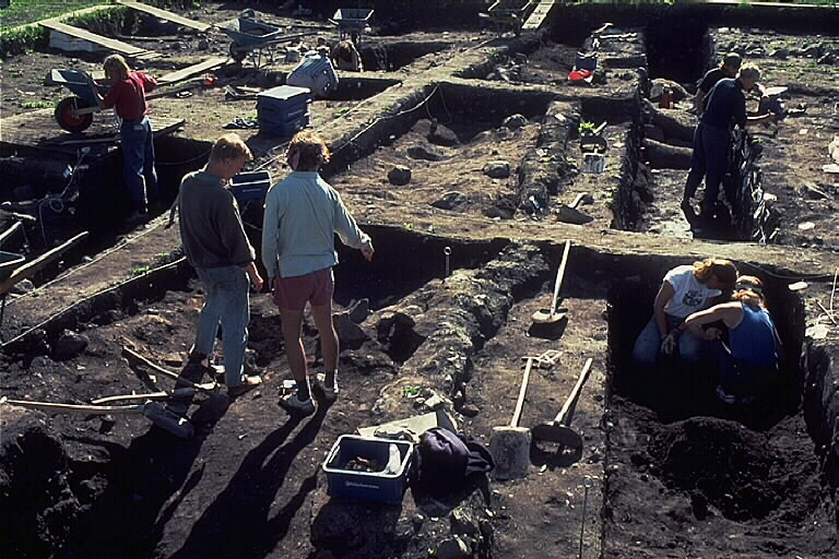 Utgrävning. Motiv: Björkö-Birka Nyckelord: Riksintressen, Världsarv Kategori: ArbetsmotivUtgrävning.